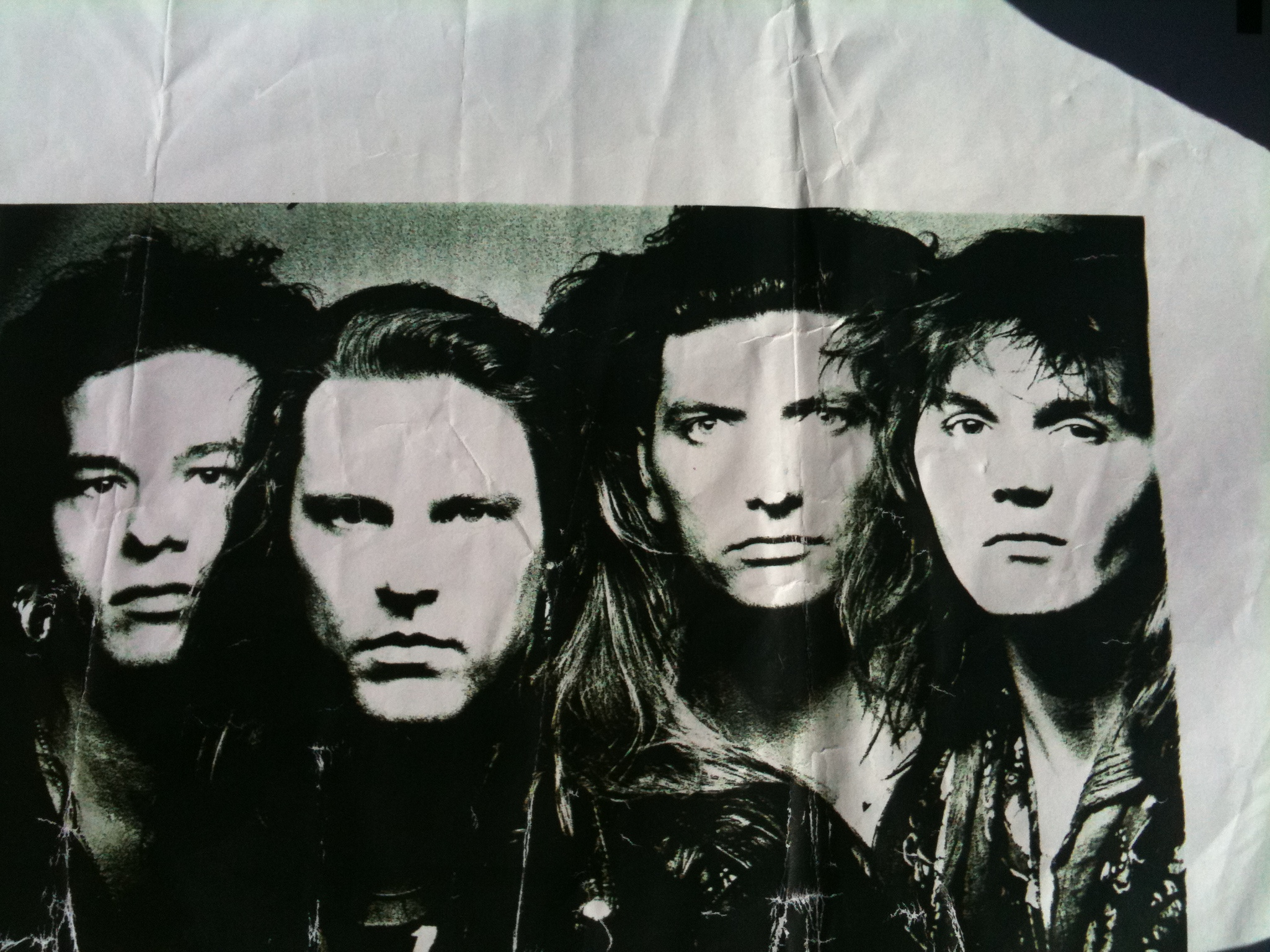 Die Band Riff 1990. vlnr.:Burkhard Westerhoff,William Lennox,Volker Britz,Frank Becking